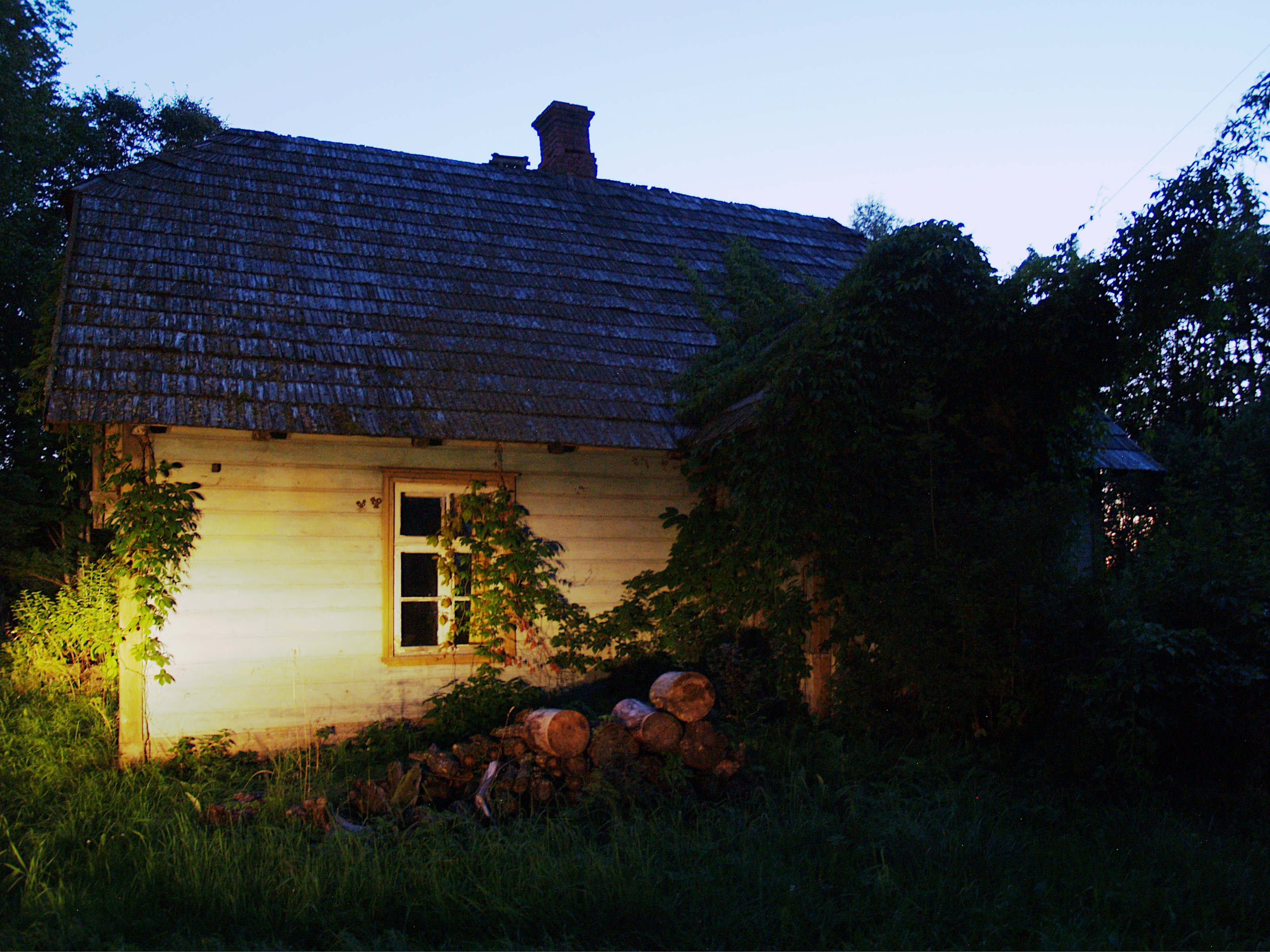 Rein Sepa kodutalu Ipiķi (Ööbiku) külas Lätis.